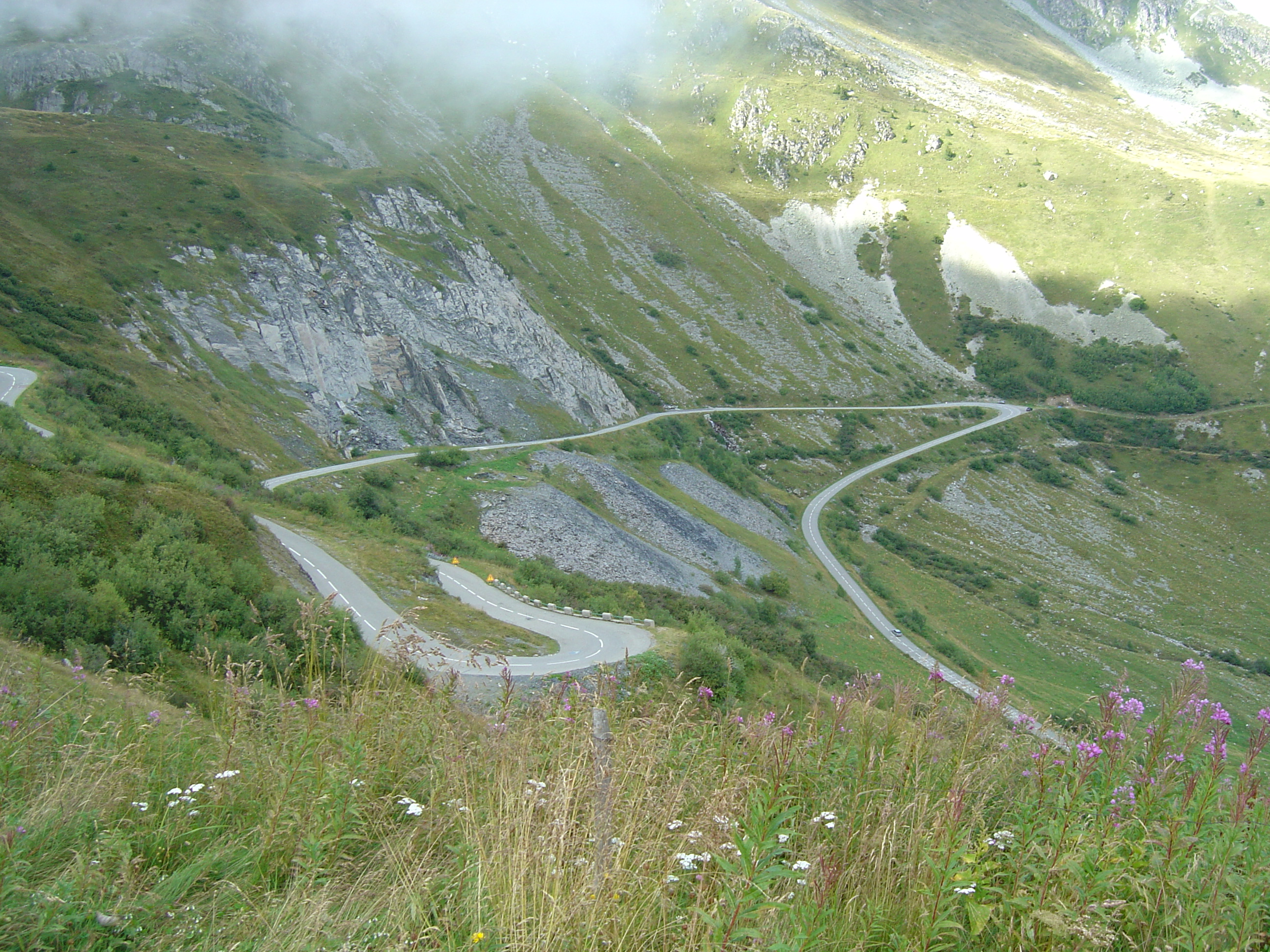 Ultimes lacets du col de la Madeleine sur le versant nord